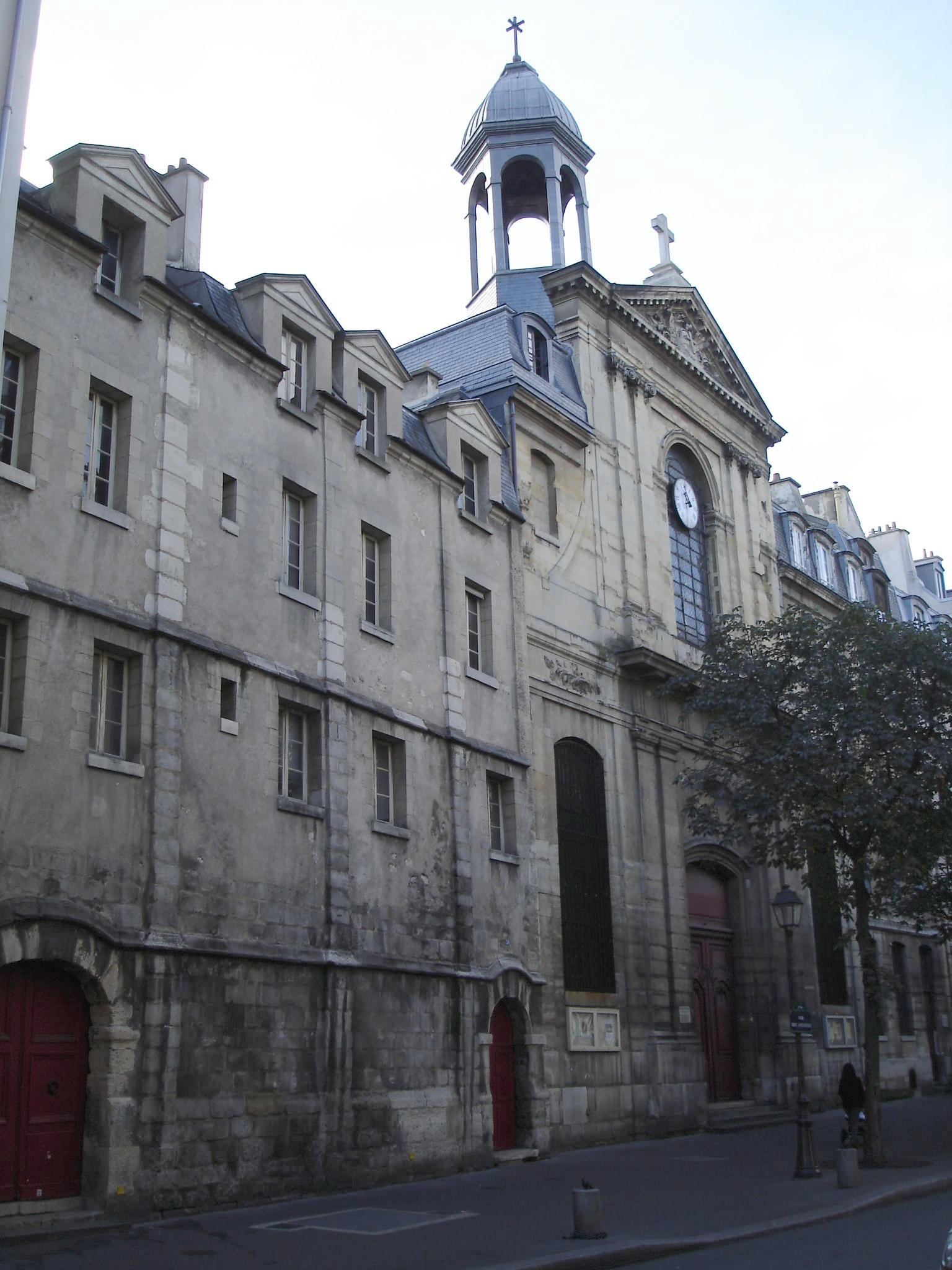 "Église des Billettes": Lutherian church, rue des Archives, Paris